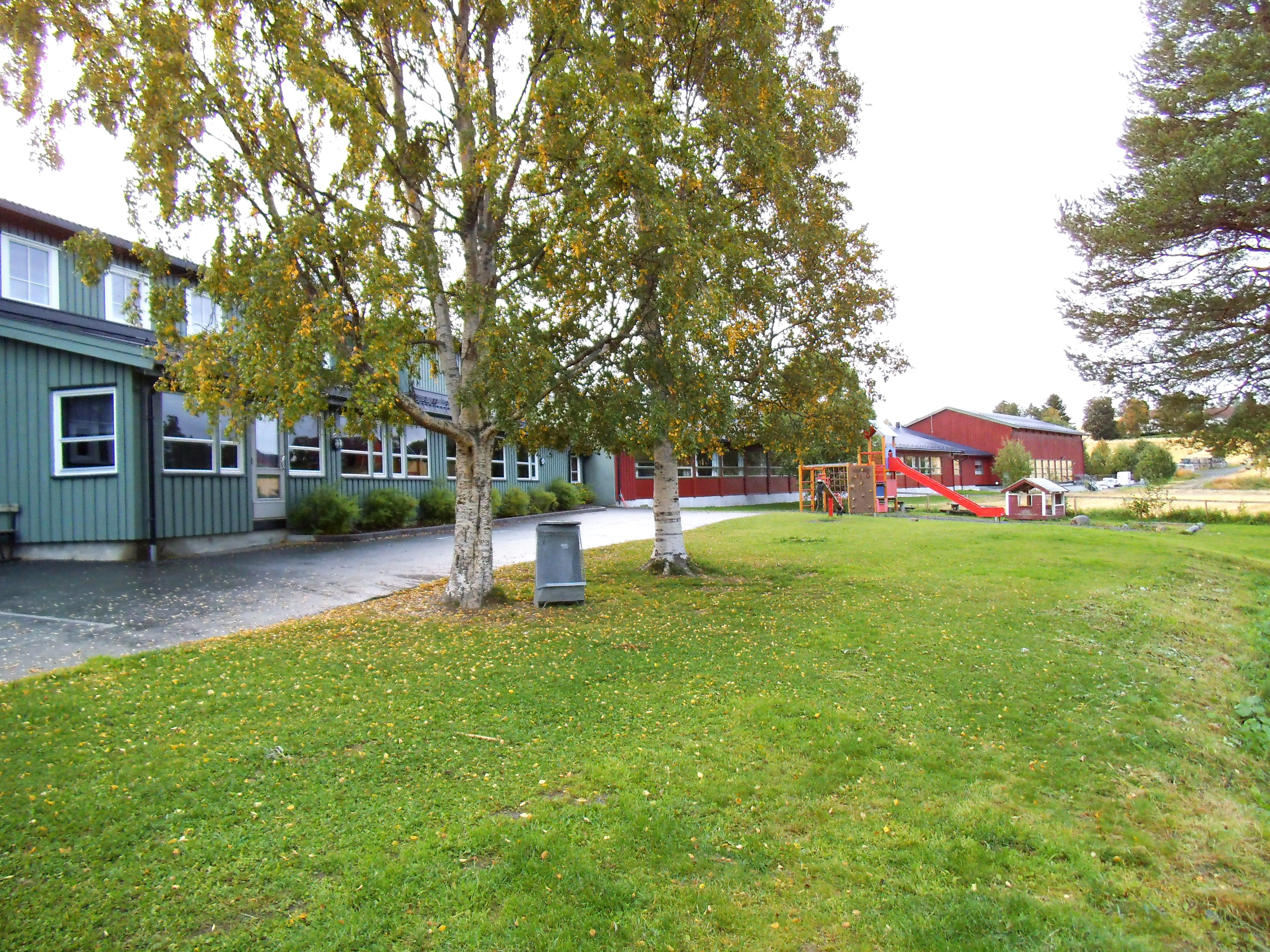 Baksiden av skolen. Barnskolen er de grønne bygningene nærmest kameraet. Ungdomsskolen i brunt.